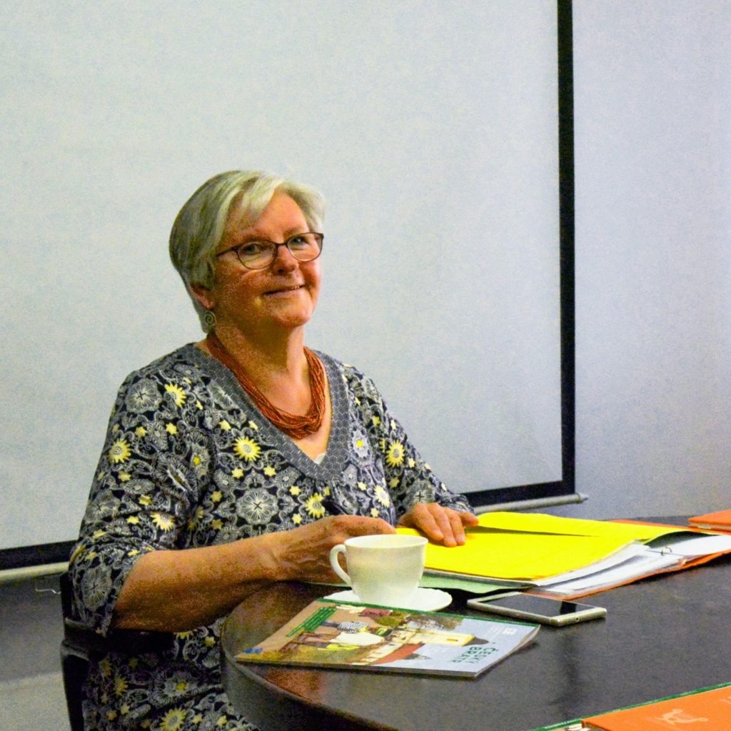 Daniela Ženatá, šéfredaktorka časopisu 2010-2020.